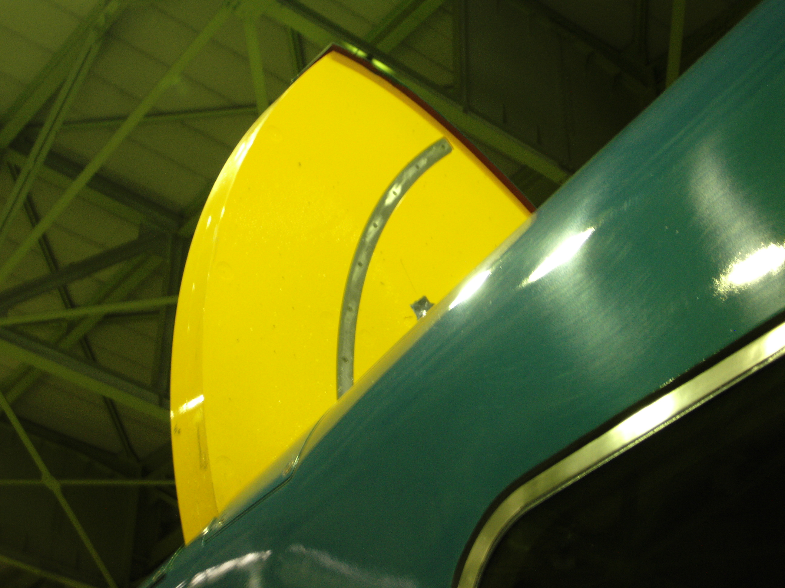 新幹線総合車両センターで投稿者が撮影